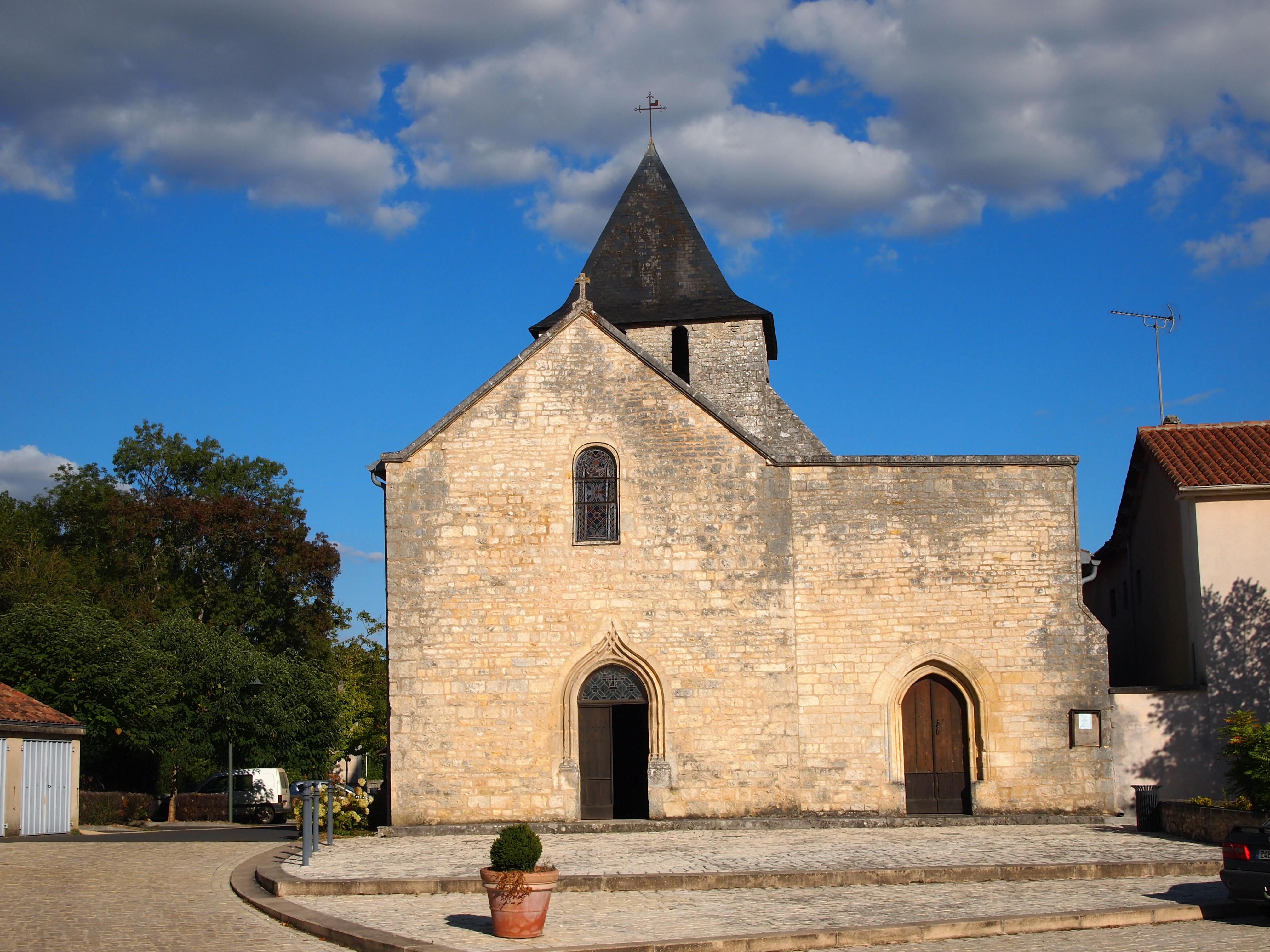 église d'Aunac en Charente (France)